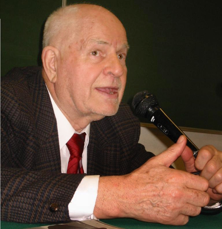 Jan Machulski